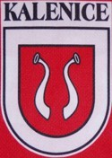 znak obce Kalenice